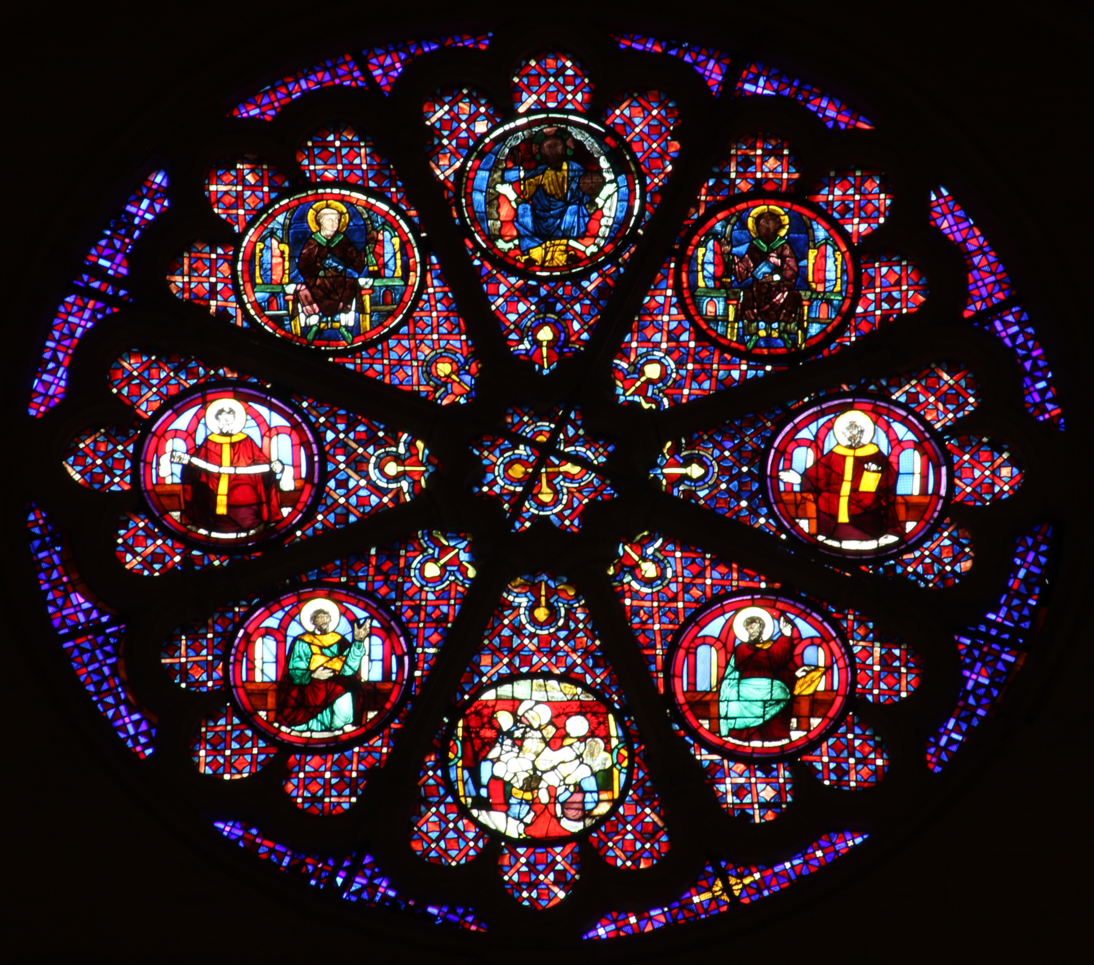 Rosace dans la Primatiale Saint-Jean à Lyon.